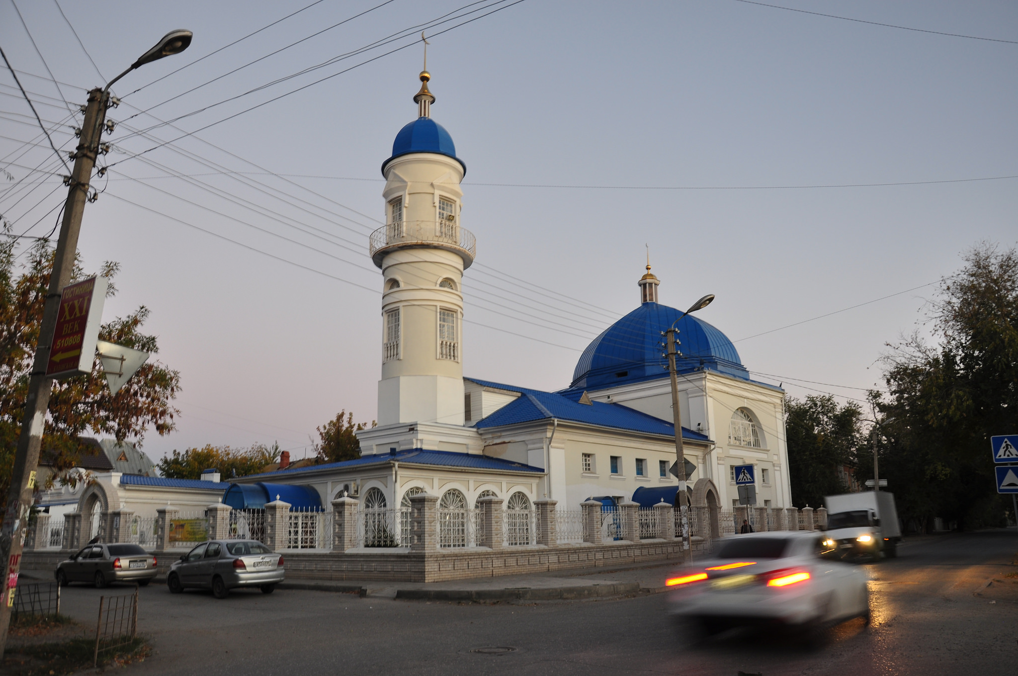 Мечеть «Белая» (Астраханская область, Астрахань, З. Космодемьянской улица, 41, Бэра улица, 15, Спартаковская улица, 34)